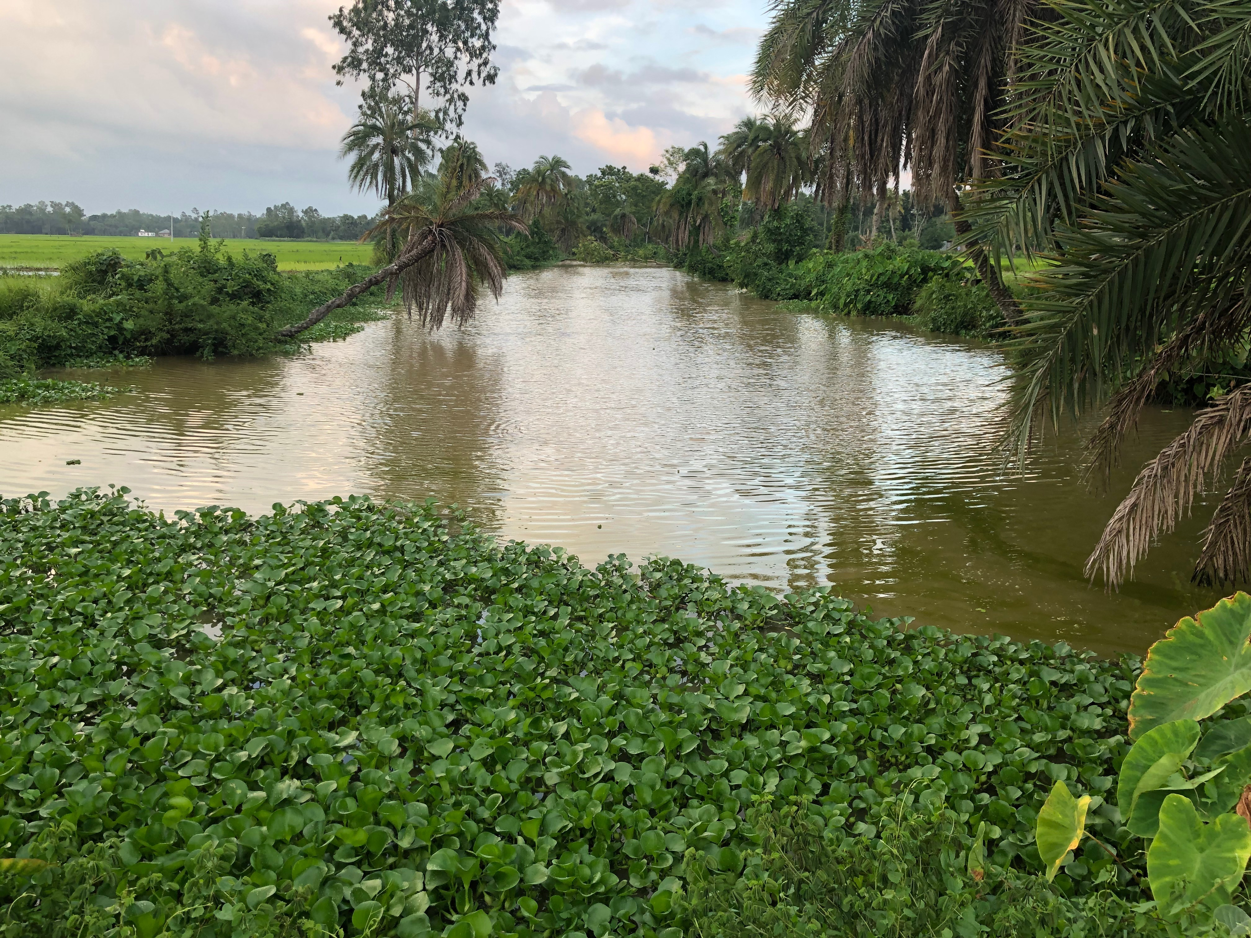 গুনাহার জমিদার বাড়ির বাম পার্শ্বের খালের দৃশ্য